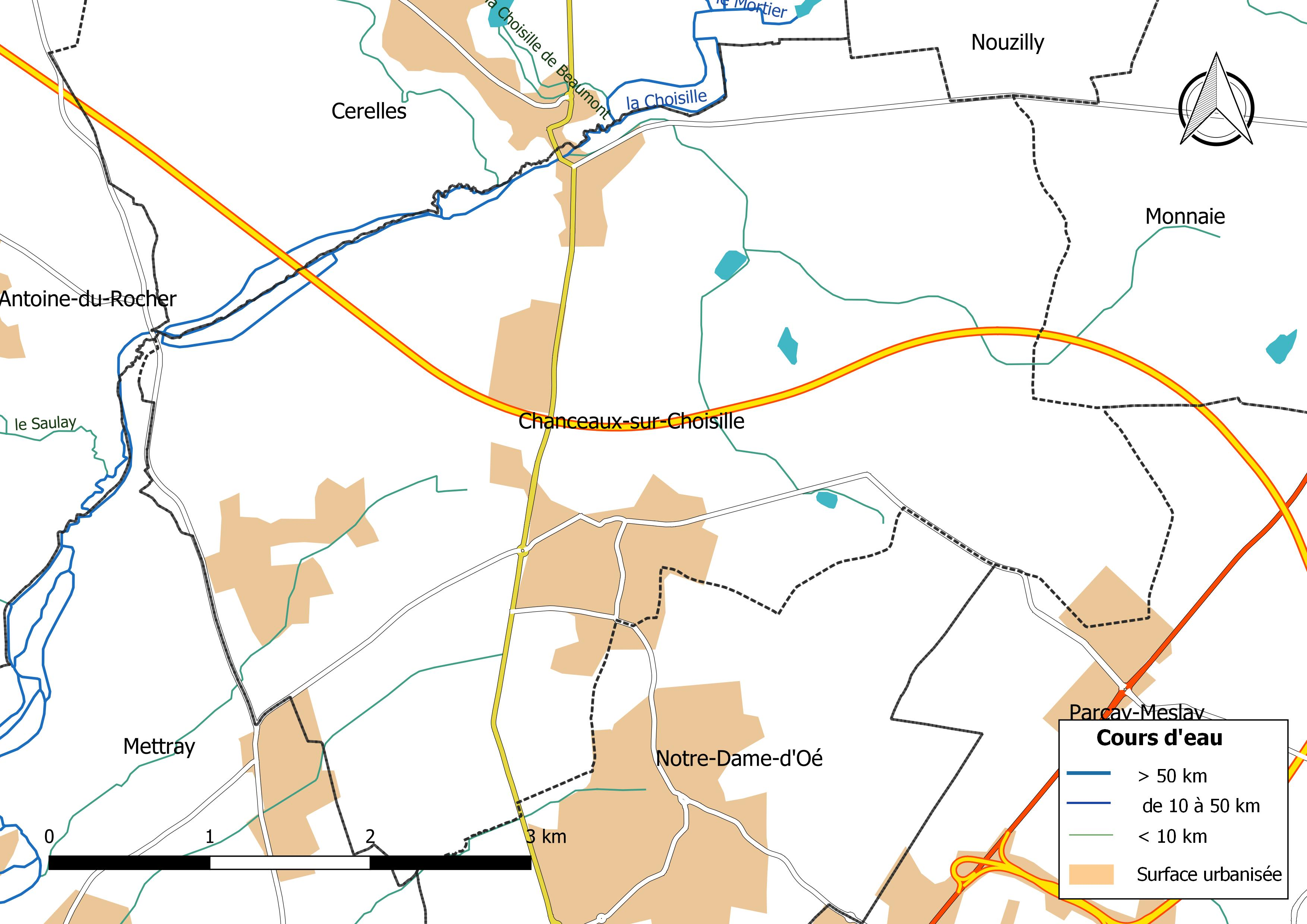 Carte du réseau hydrographique de la commune de Chanceaux-sur-Choisille (France).